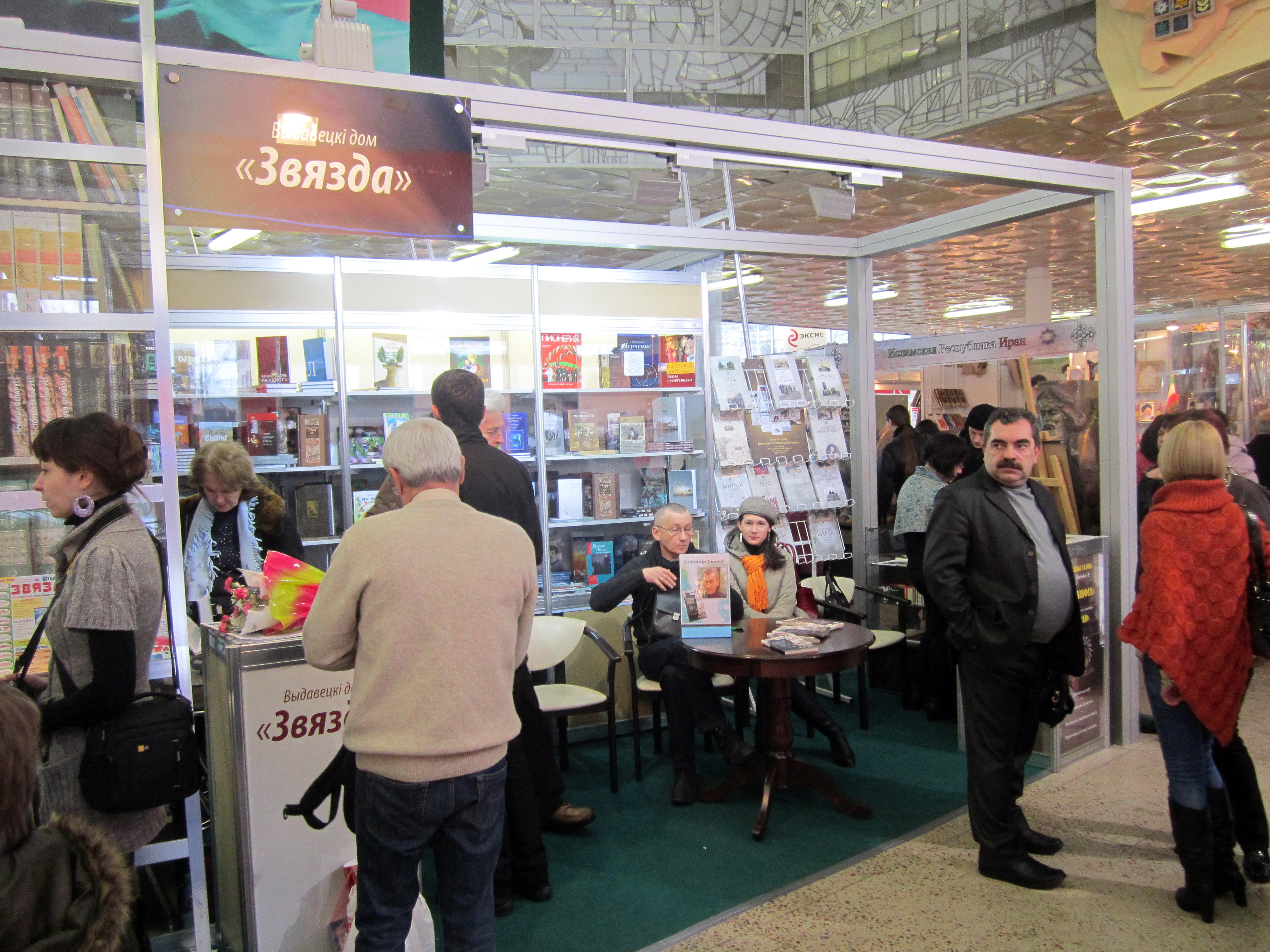 Стэнд Выдавецкага Дома "Звязда". XX Міжнародная кніжная выстава, Мінск, 2013